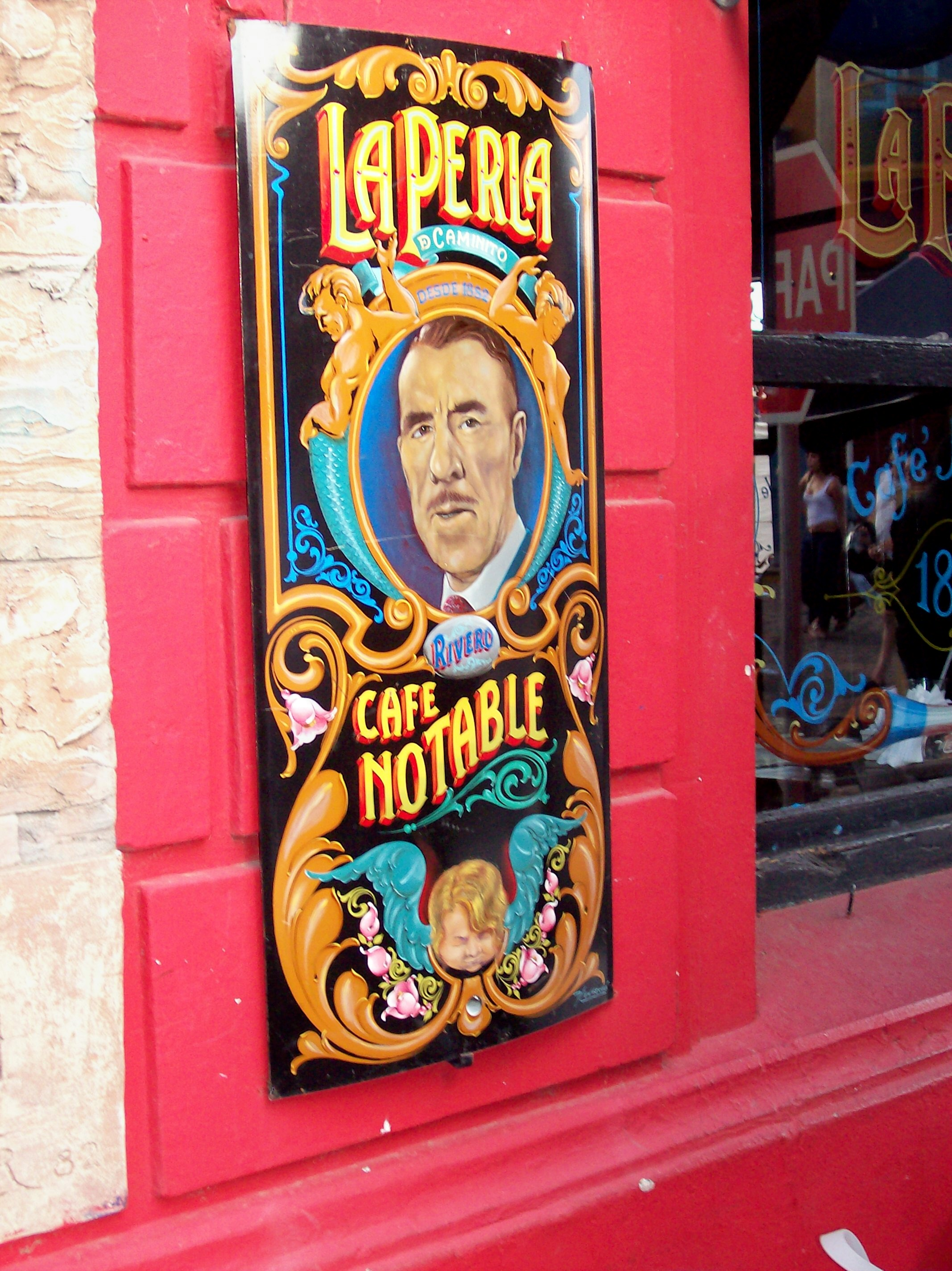 FILETEADO PORTEÑO: Buenos Aires, Edmundo Rivero. fileteado realizado por Sergio Menasché